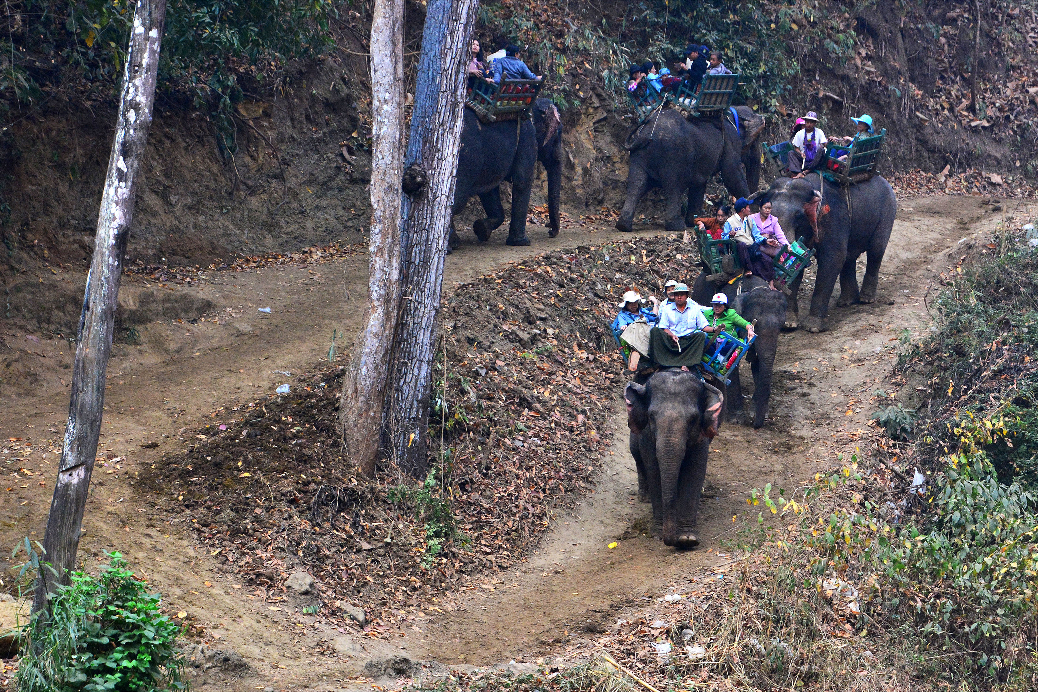 မြန်မာဘာသာ: အလောင်းတော်ကဿပ ဥယျာဉ်